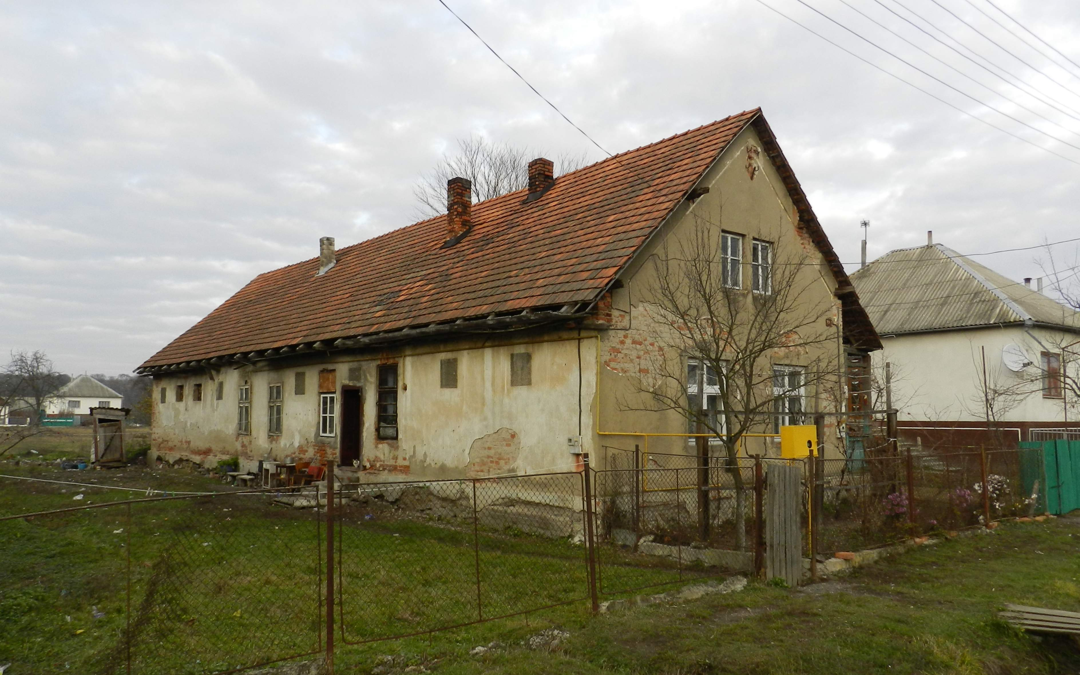 Колишній будинок чехословацьких легіонерів, нині приватне житло